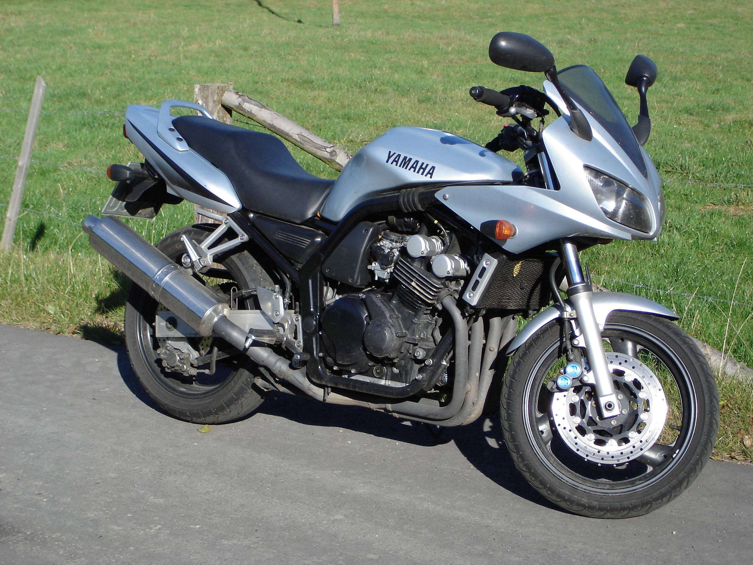 Yamaha FZS600 Fazer (RJ02)